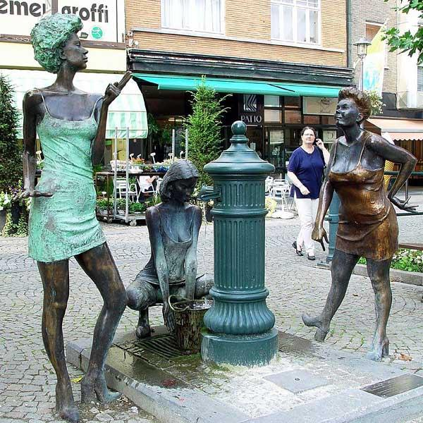 Beschreibung: Die Innenstadt von Tongeren Aufnahmedatum: 29. August 2002 Fotograf: ArtMechanic